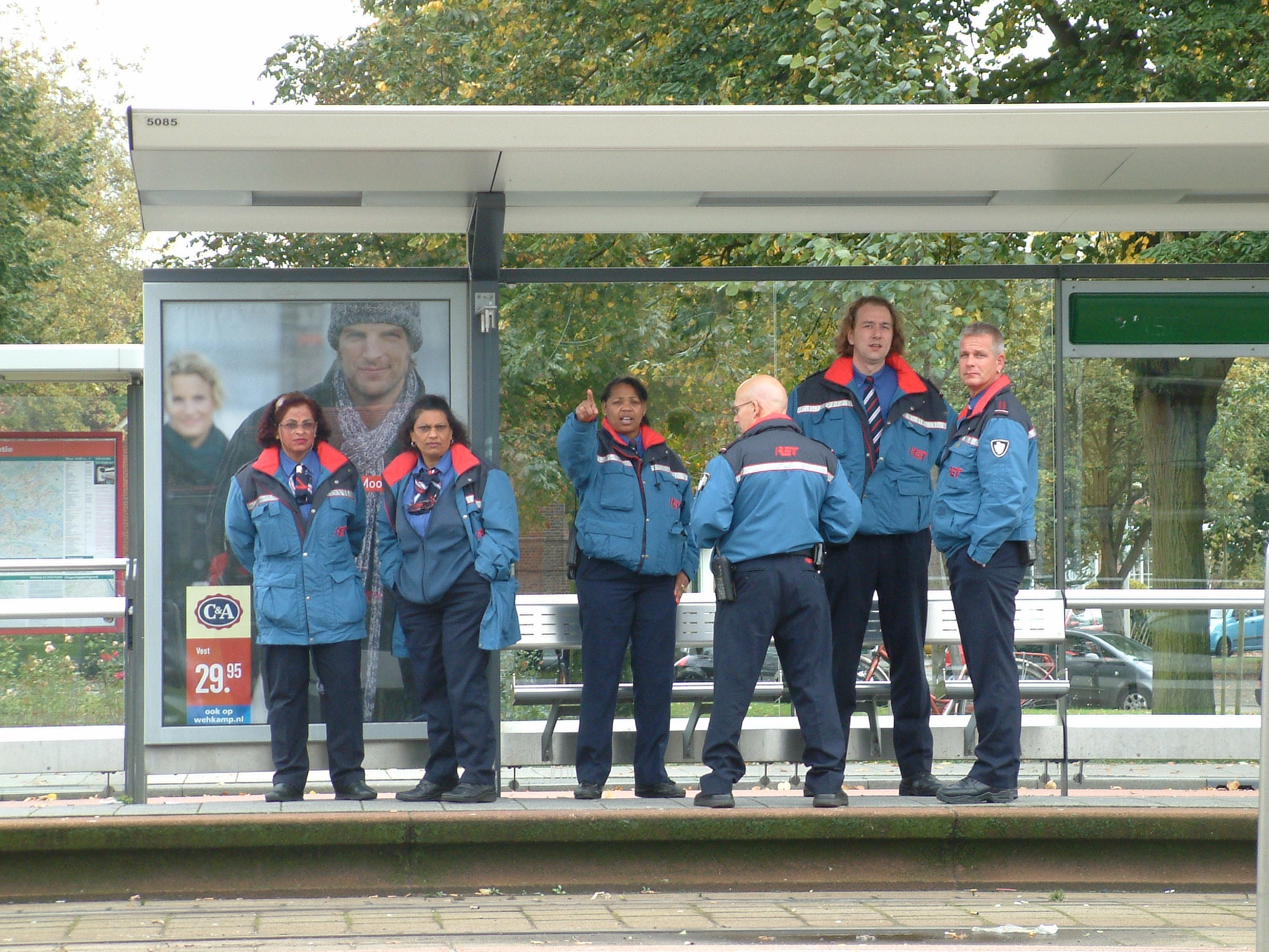 Nest controleurs van de RET bij het Maasstad Ziekenhuis